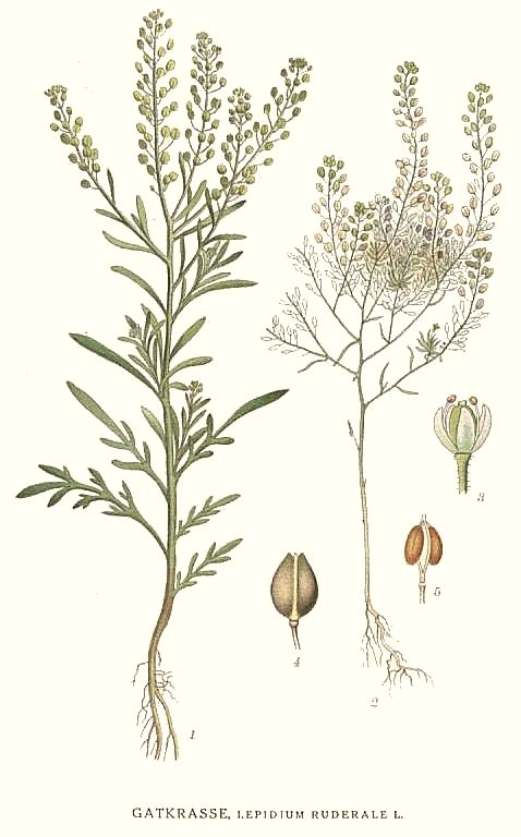 Original Description Gatkrasse, Lepidium ruderale L.